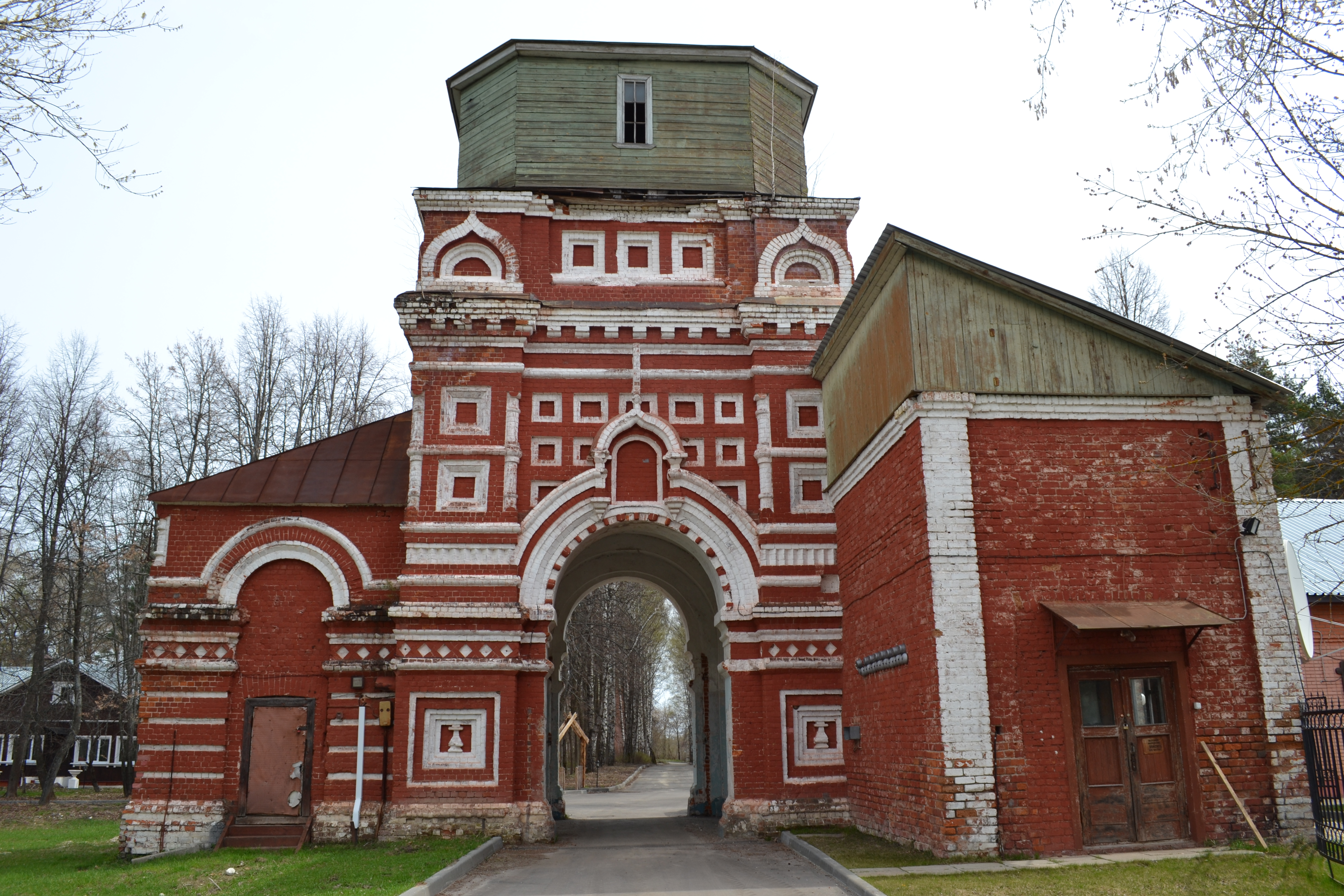 Монастырь Александро-Мариинский, Святые ворота (Московская область, Шатурский район, деревня Евлево)